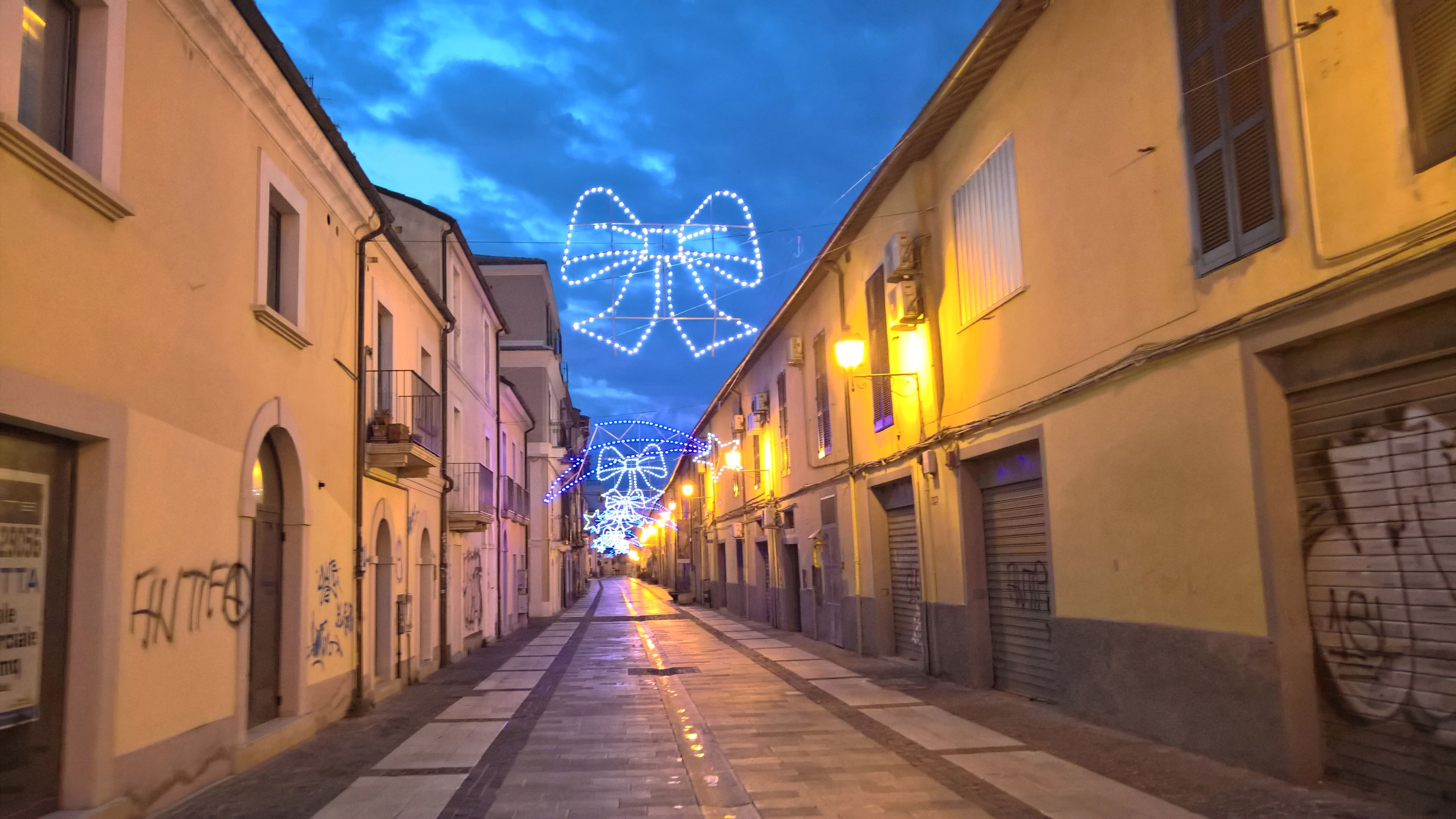 Pescara 2018